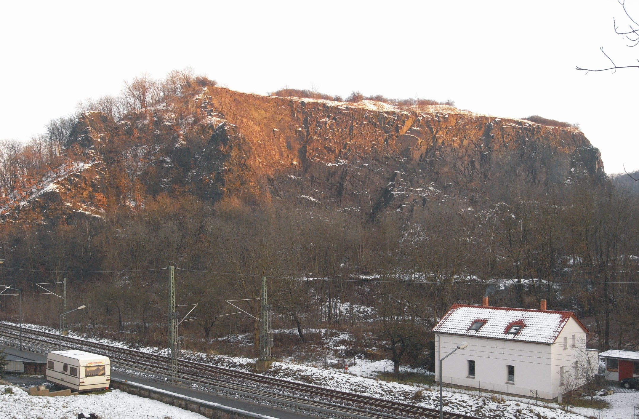 die Heidenschanze im Plauenschen Grund, Dresden (Sachsen, Deutschland)